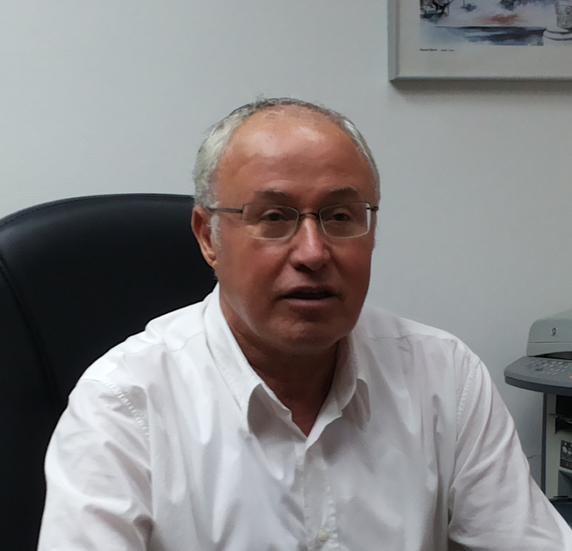 אלי דיין 2014